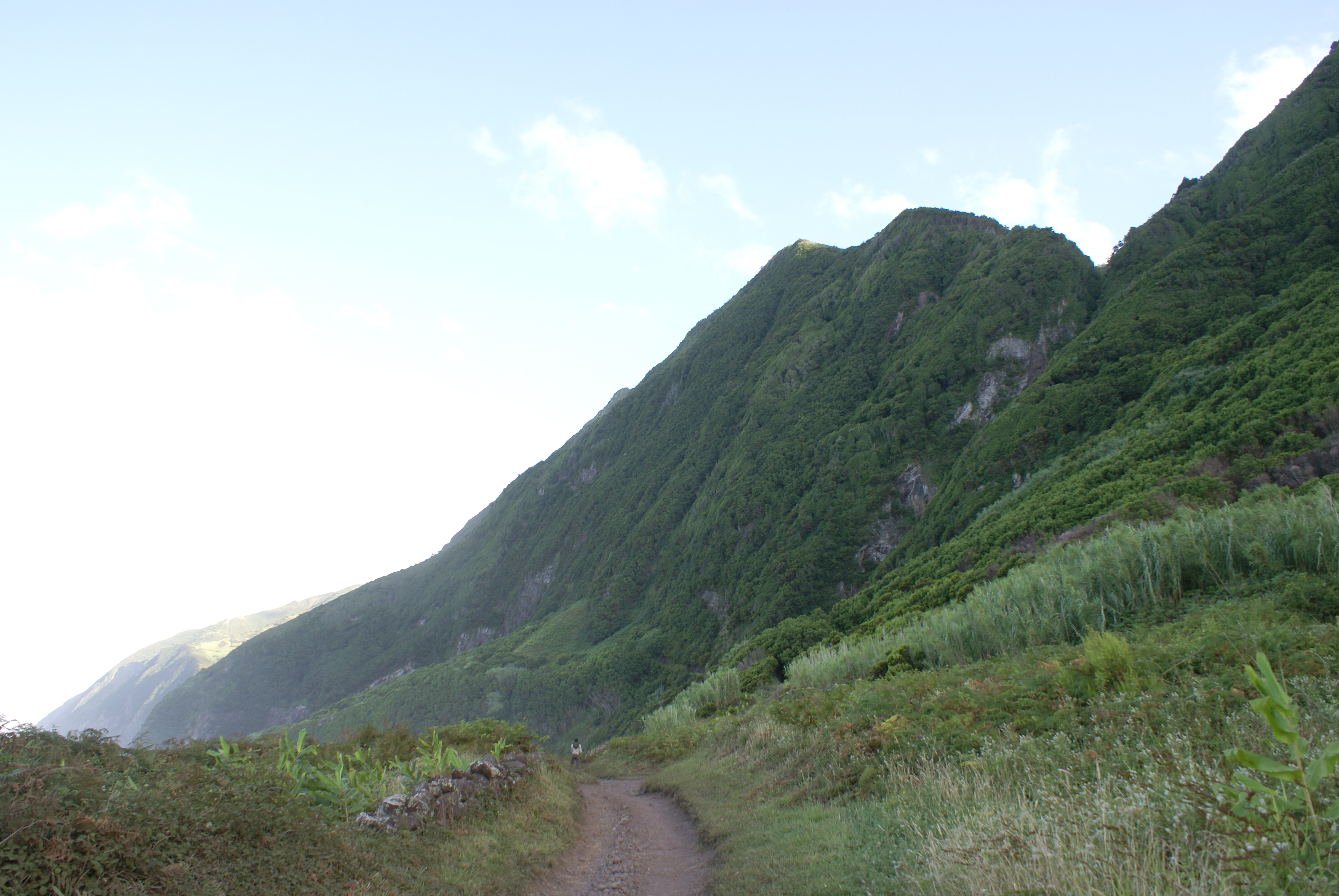 Falésias entre a Fajã da Caldeira de Santo Cristo e a Fajã do Belo, já próximo a esta última, Calheta, ilha de São Jorge, Açores